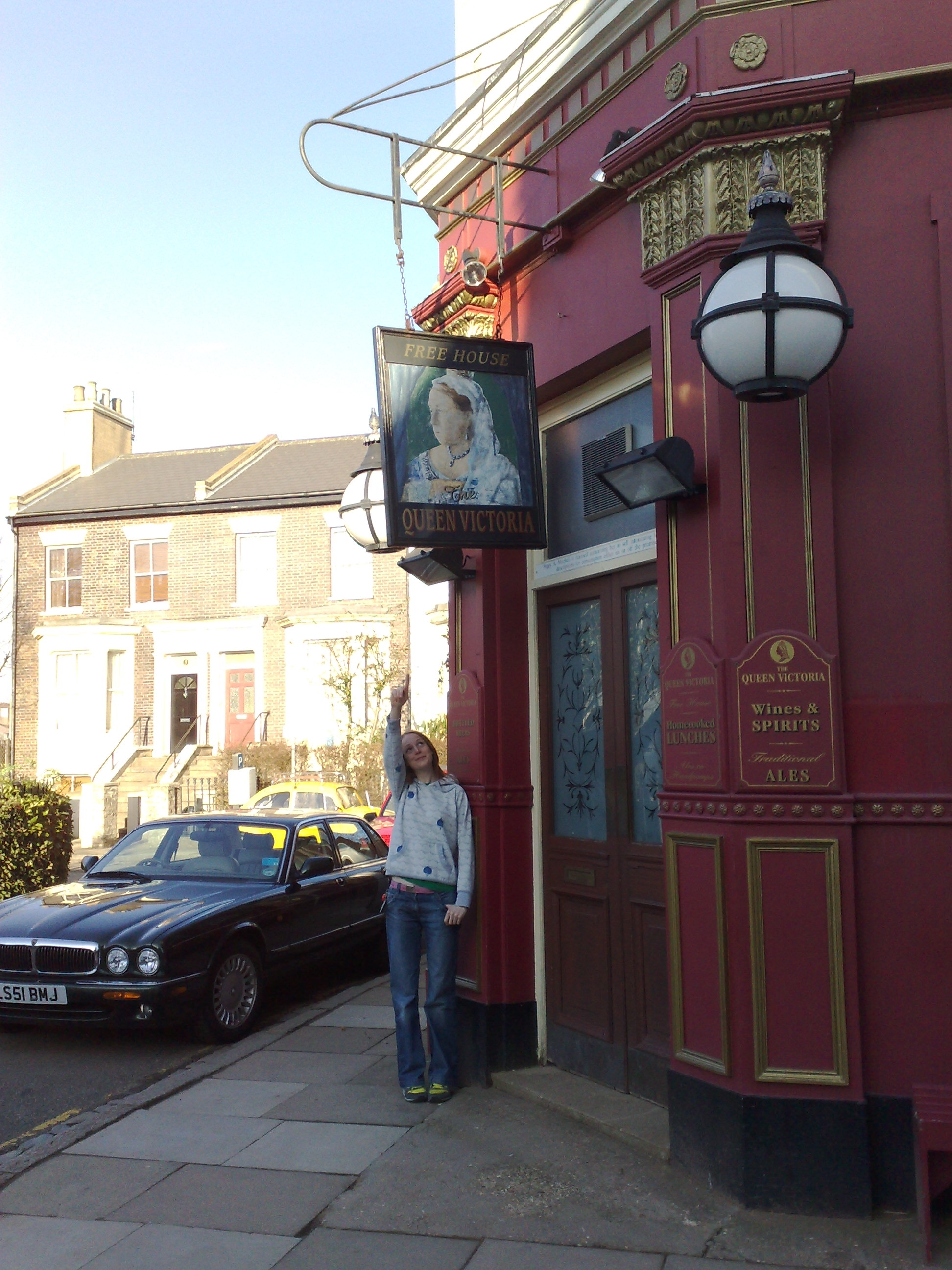 Enders Queen Vic